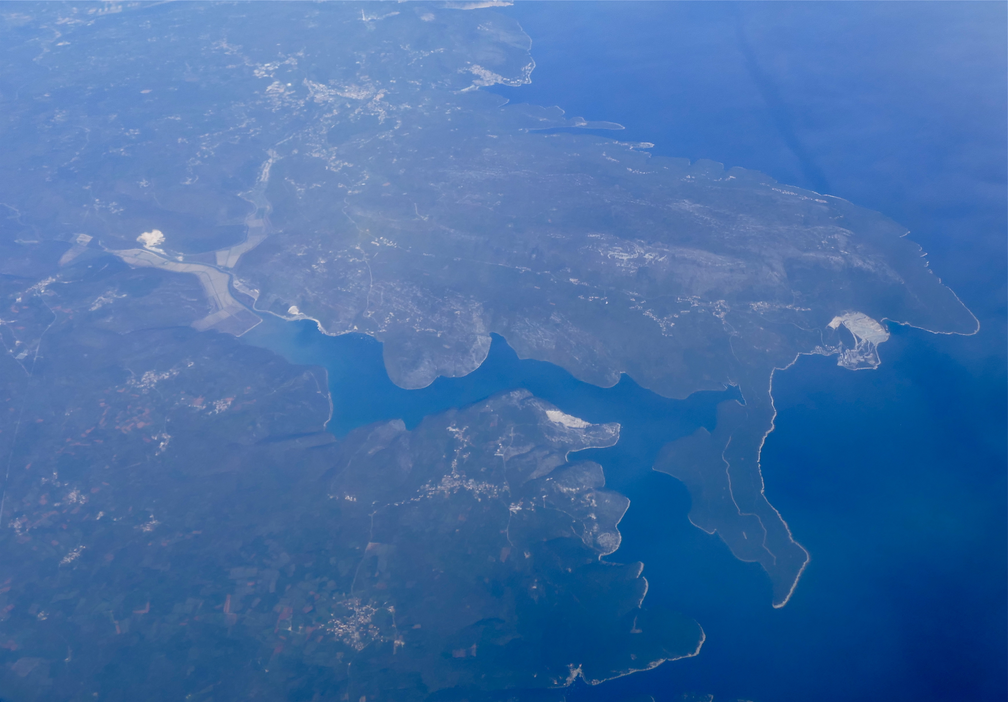 Raski zaljev, Istria, CROATIA